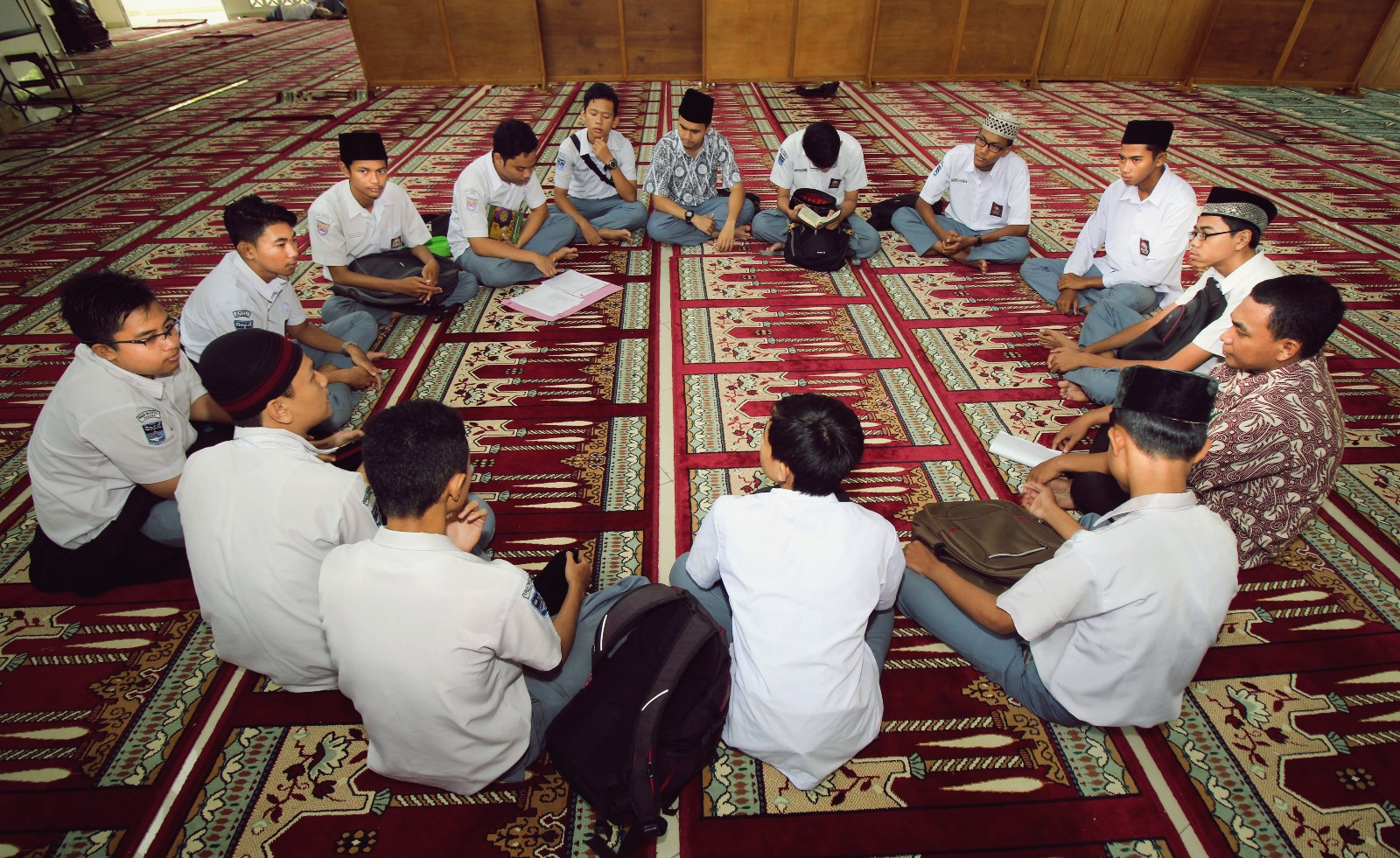 Kegiatan mentoring saat Pesantren Ramadhan di SMA 1 Padang